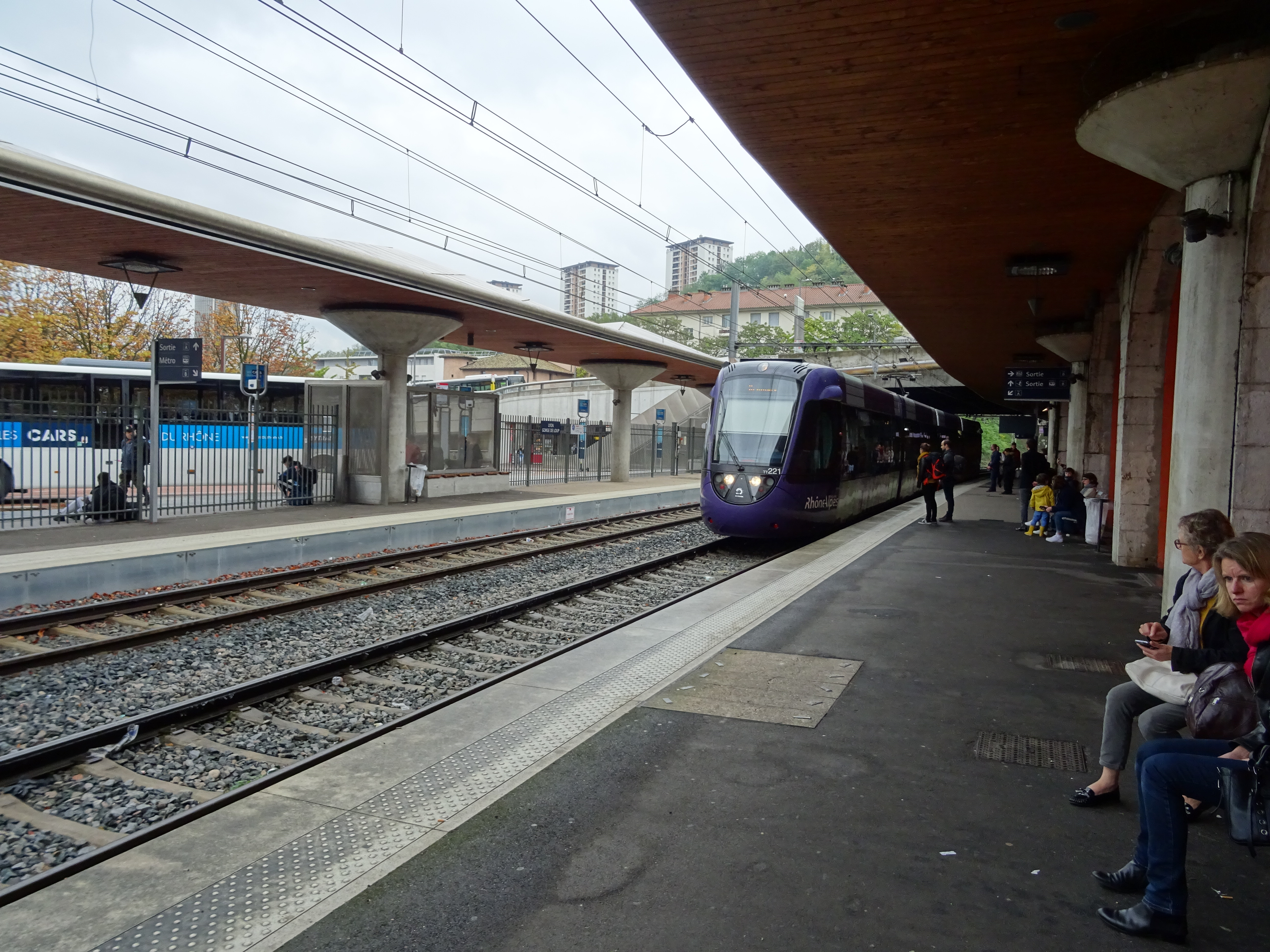 U 52500 à quai à Gorge de Loup. Il desservira ensuite Ecully.